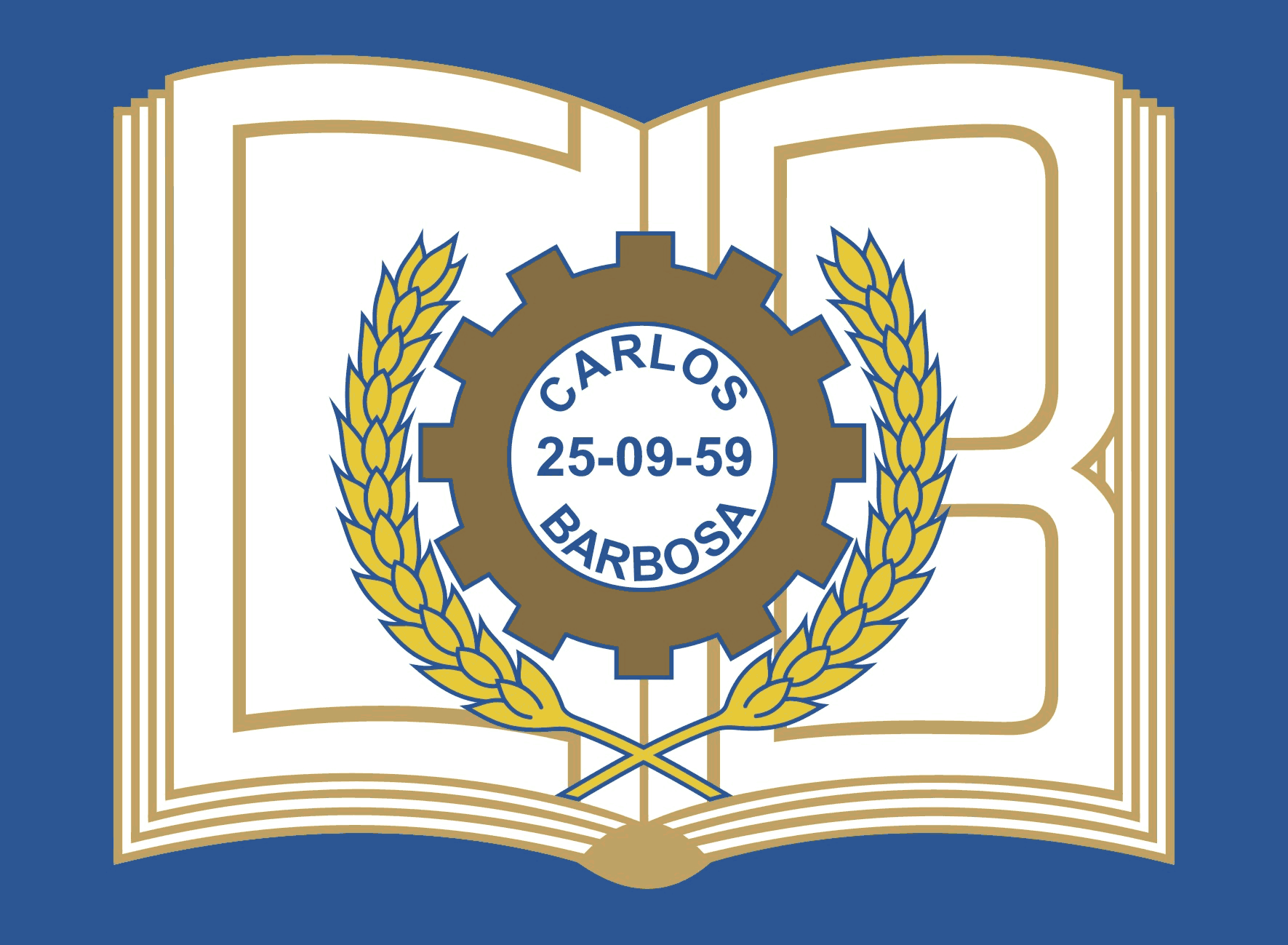 Bandeira do Município de Carlos Barbosa - RS - Brasil